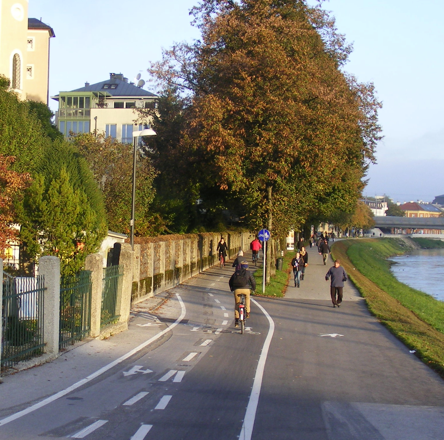 morgendlicher Berufsverkehr am Salzachufer in Salzburg